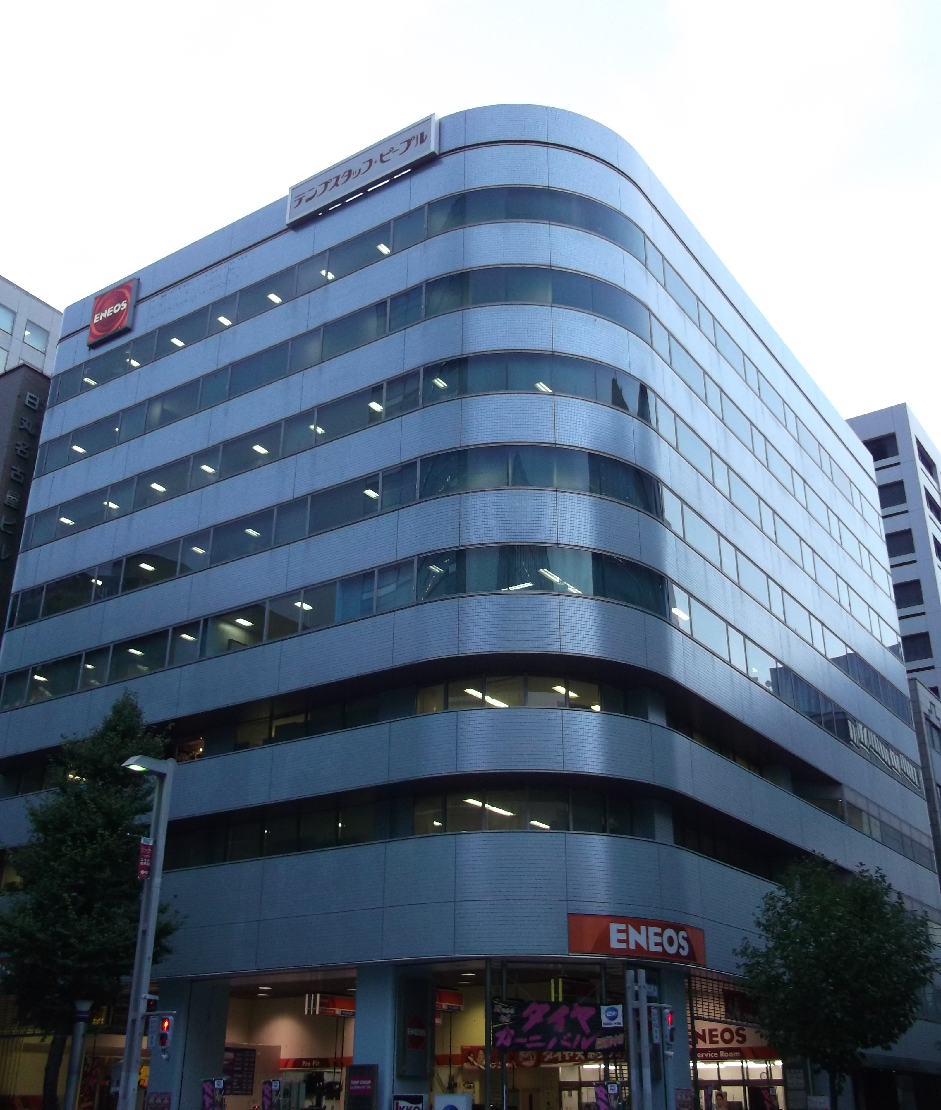 名古屋市中区の日石栄ビルを南側公道東側より撮影。トリミング処理。